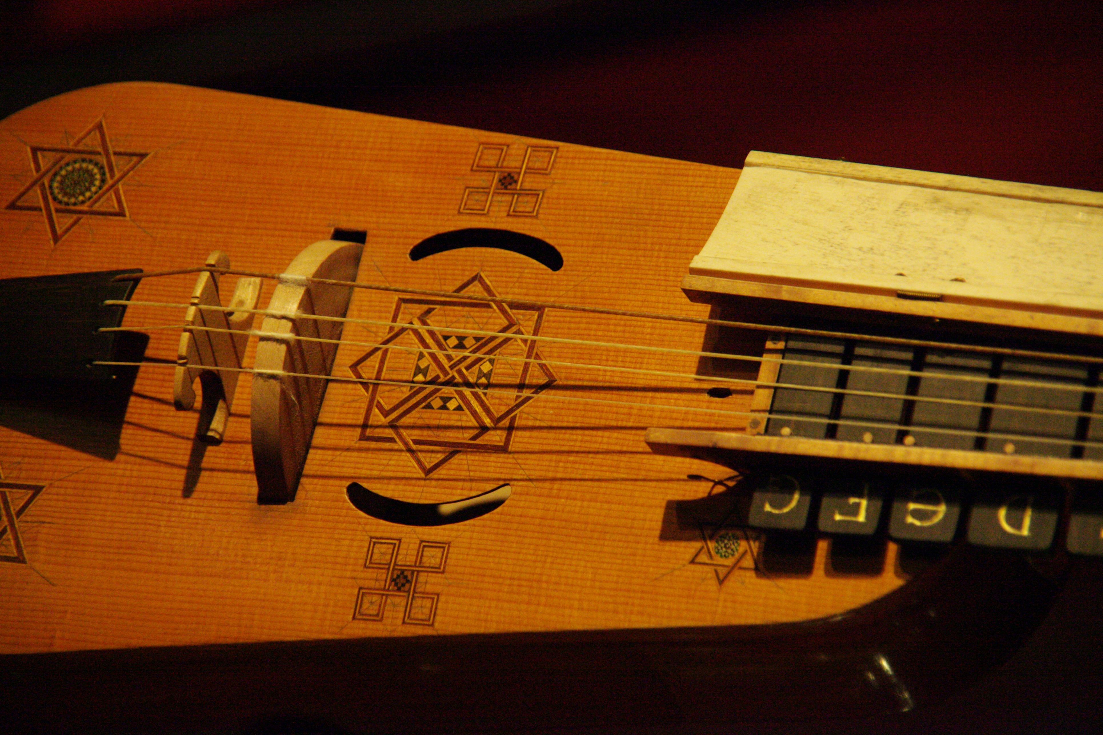 Viola de roda. Rault, Christian Le Vanneau-Irleau. 2006. Museu de la Música de Barcelona.(MDMB 1687)Instruments al Museu de la Música de Barcelona. Fotografies fetes durant el Backstage pass, el 21-11-2013